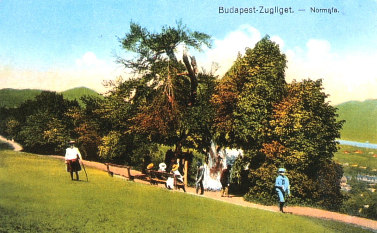 Budapest XII. kerület Zugliget Normafa 1912-ben